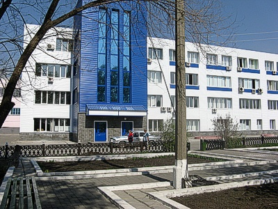 Горновский филиал ОАО БЭТ